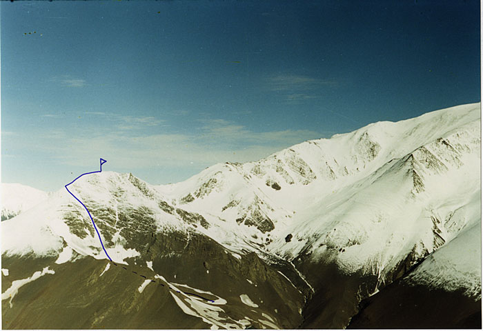 Şimal-Şərqi sirkin kluarı ilə Bazardüzünə yürüş